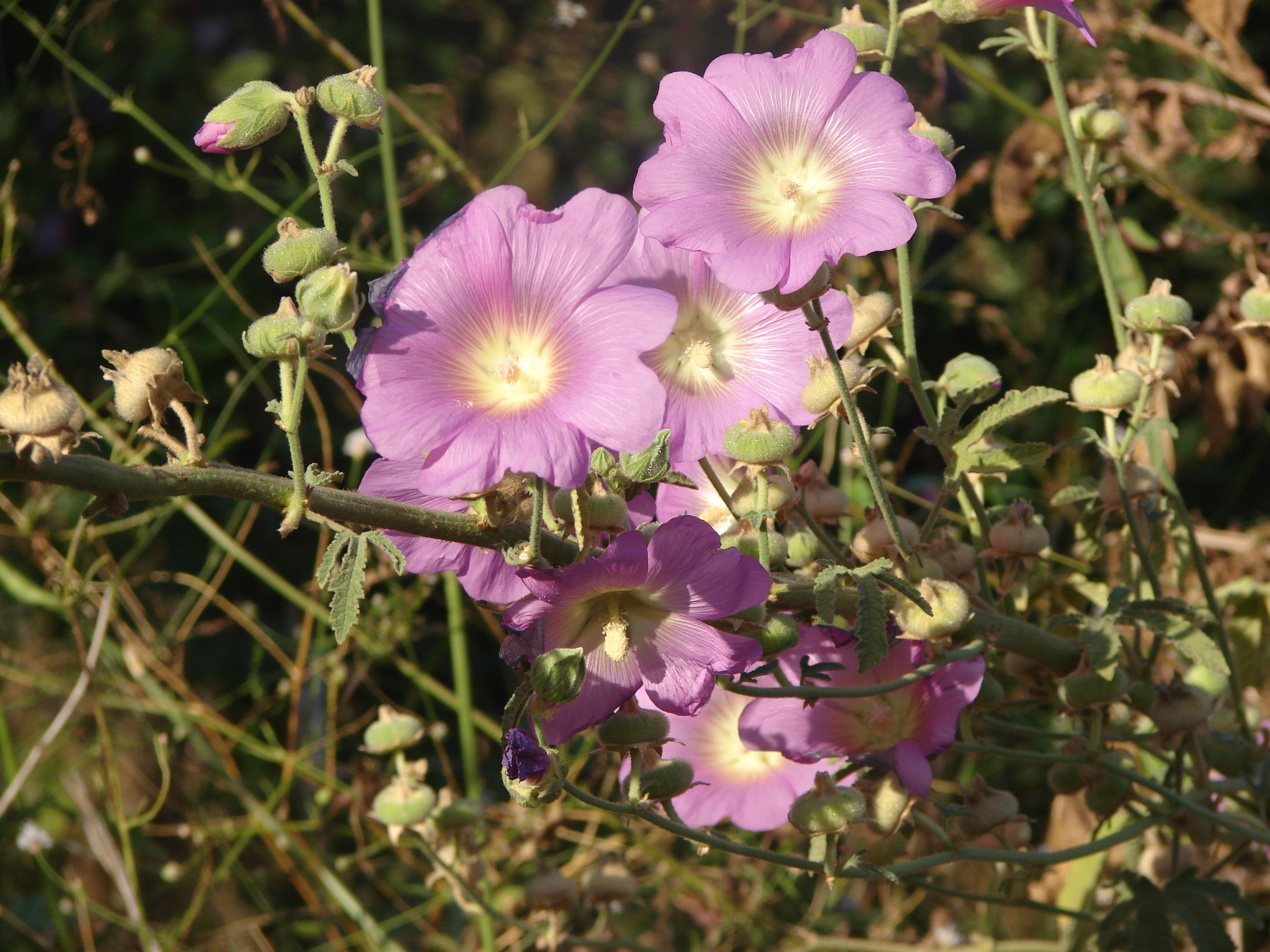 الحياة النباتية، قرية البطار